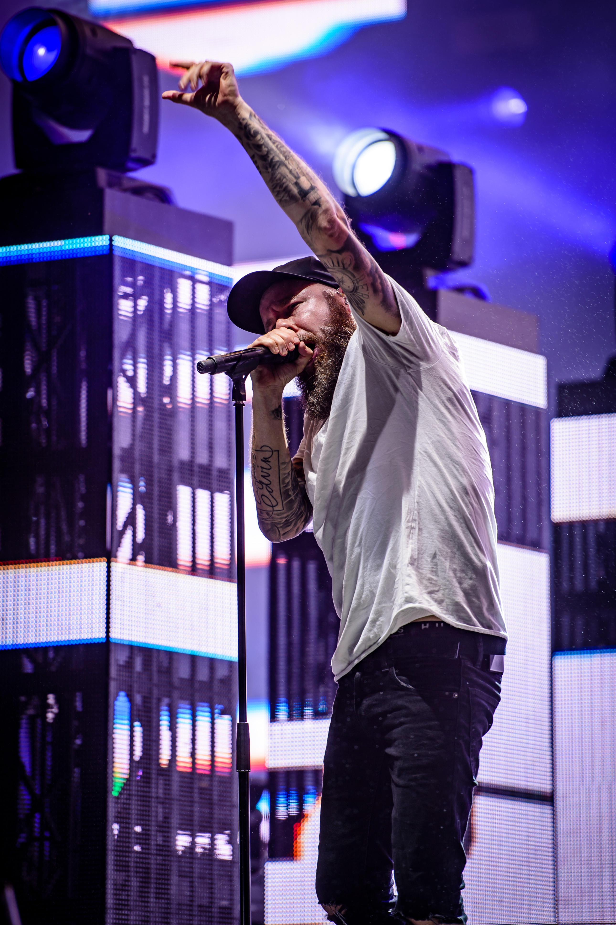 'Wacken Open Air 2018': 'Inflames'